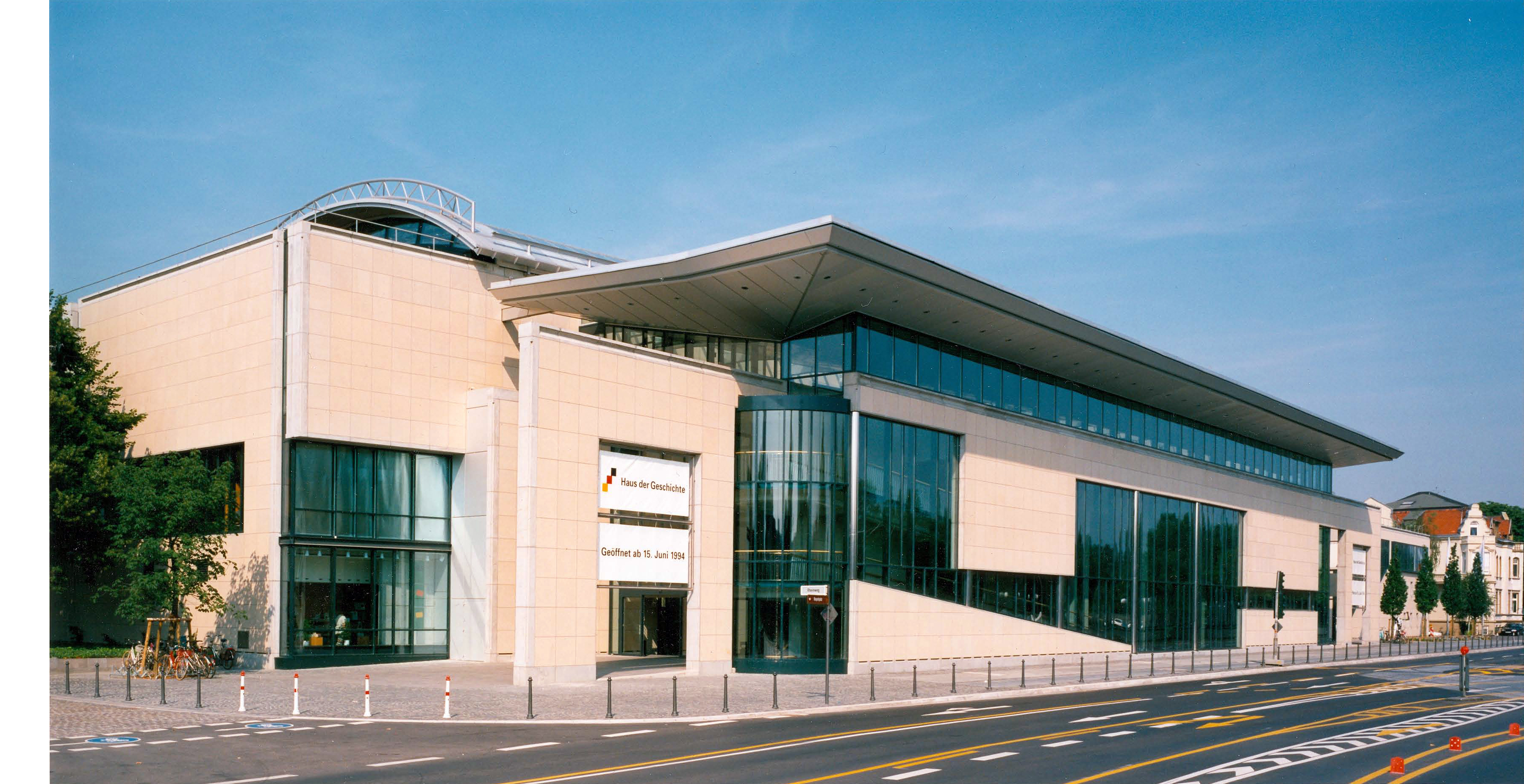 Haus der Geschichte der Bundesrepublik Deutschland, Willy-Brandt-Allee 14, Bonn-Gronau